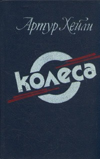 Обложка романа Артура Хейли «Колёса».